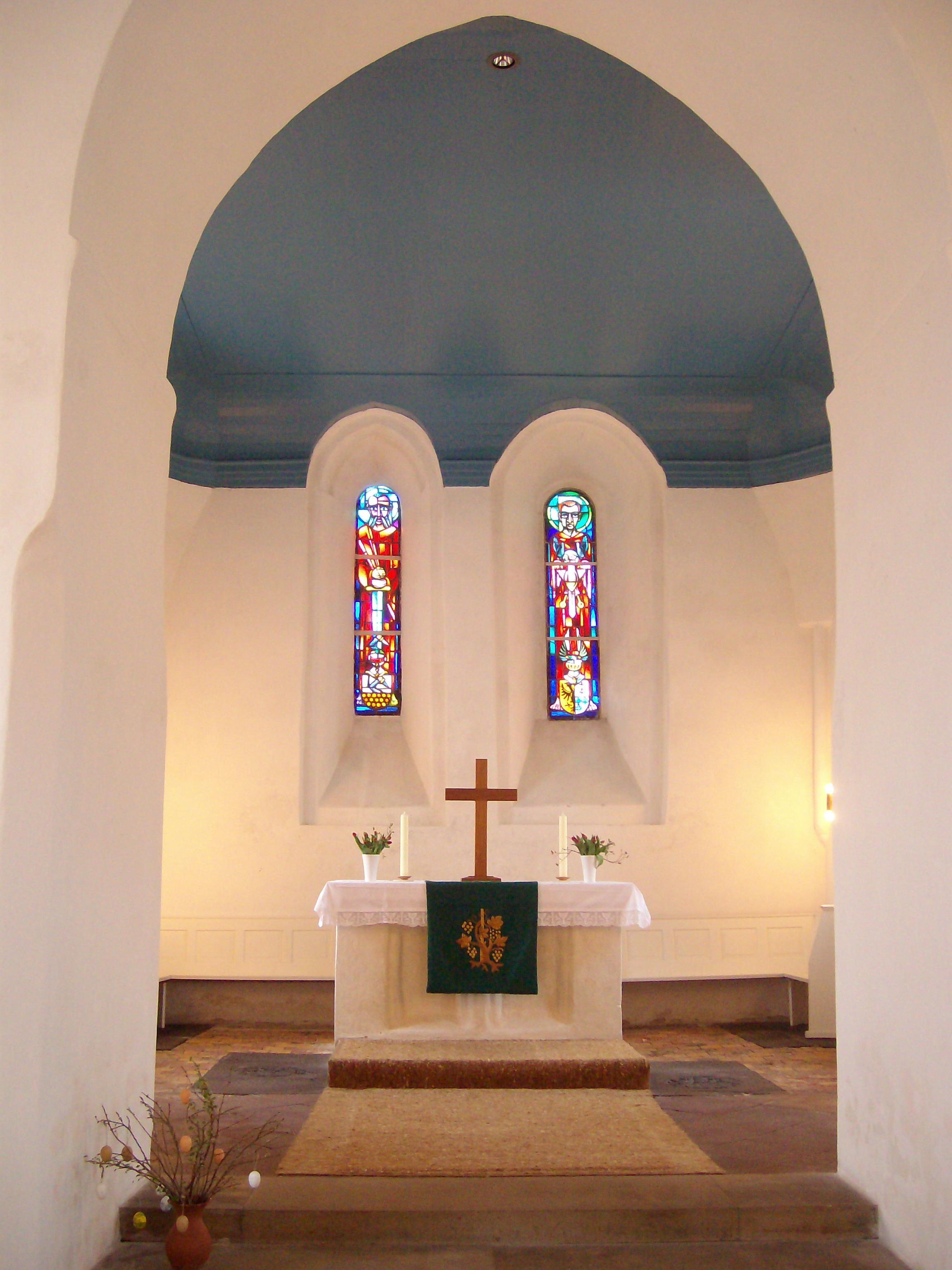 Chor der Kirche in Holtgaste, Niedersachsen, Deutschland